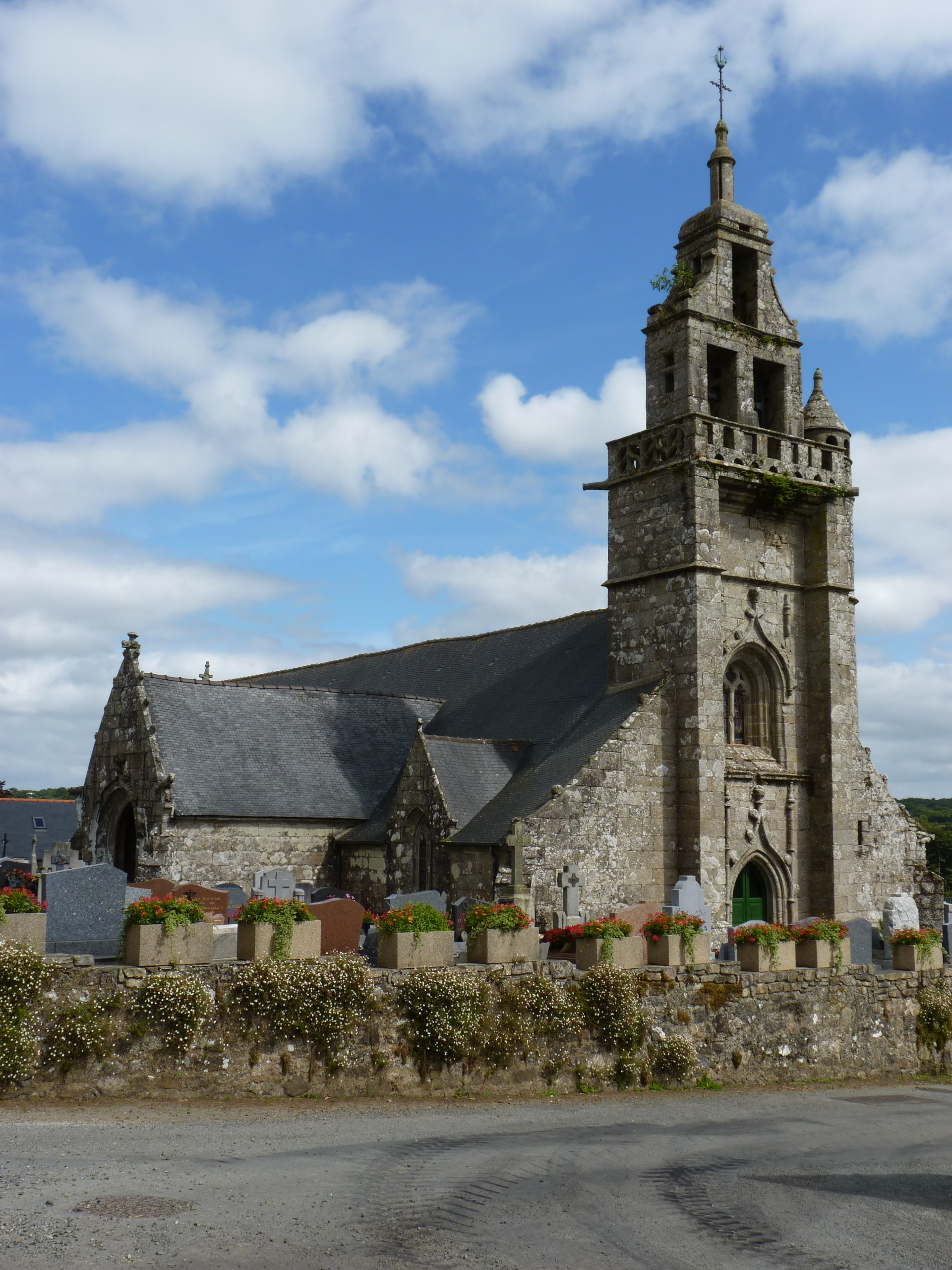 Église du 16ème siècle remaniée au 18ème siècle.